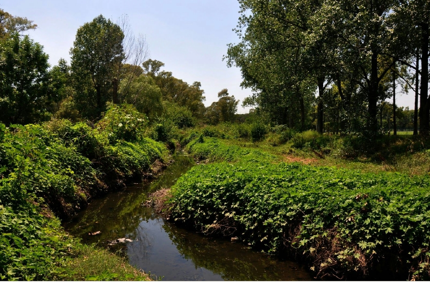 Vista del Cauce Viejo del Riachuelo, en el Parque Ribera Sur, Villa Riachuelo.